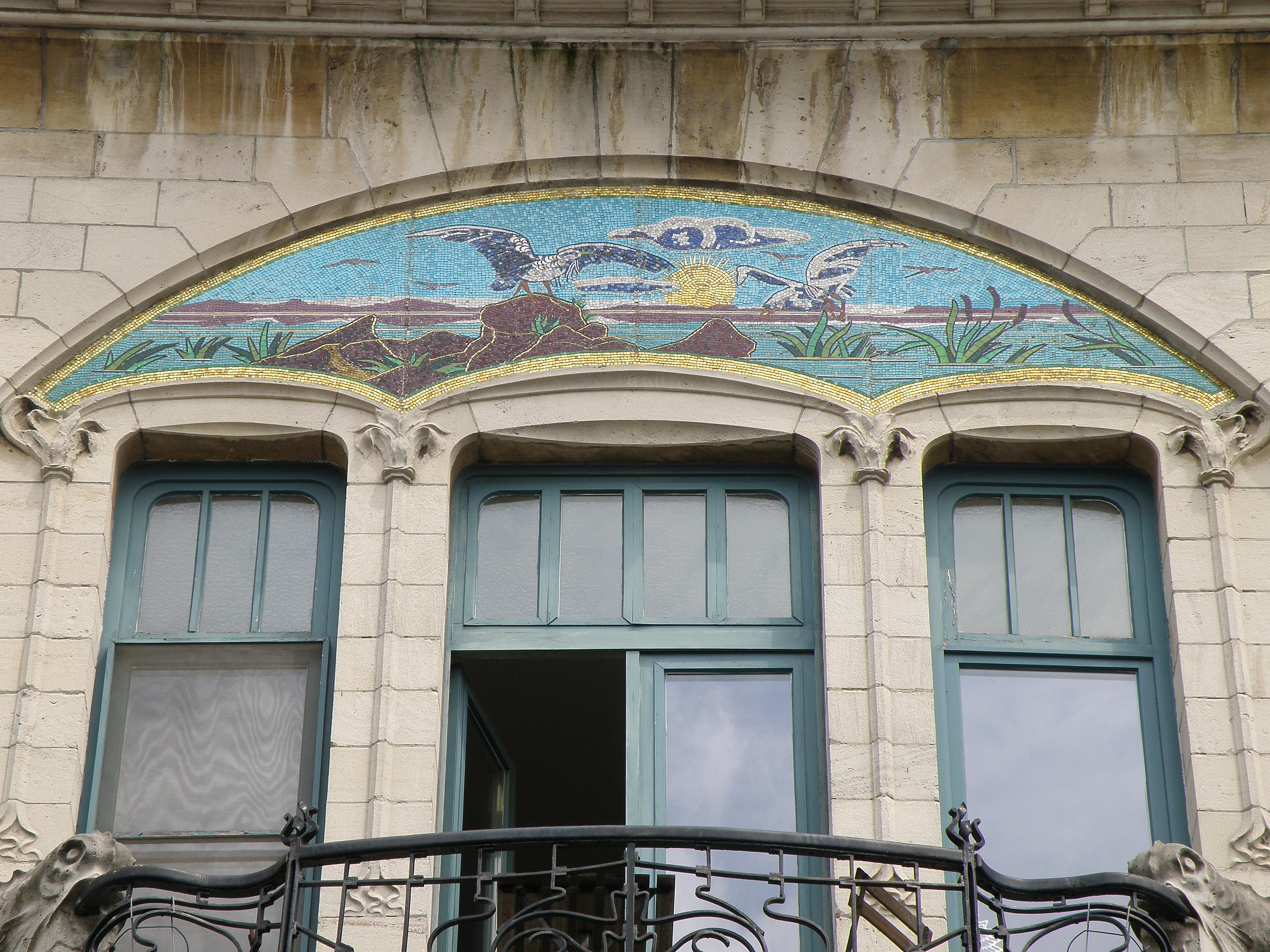 Antwerpen (België). Waterloostraat, wijk Zurenborg. Art-nouveauhuis Les Mouettes, anno 1905, n.o.v. archit. Jacques De Weerdt.